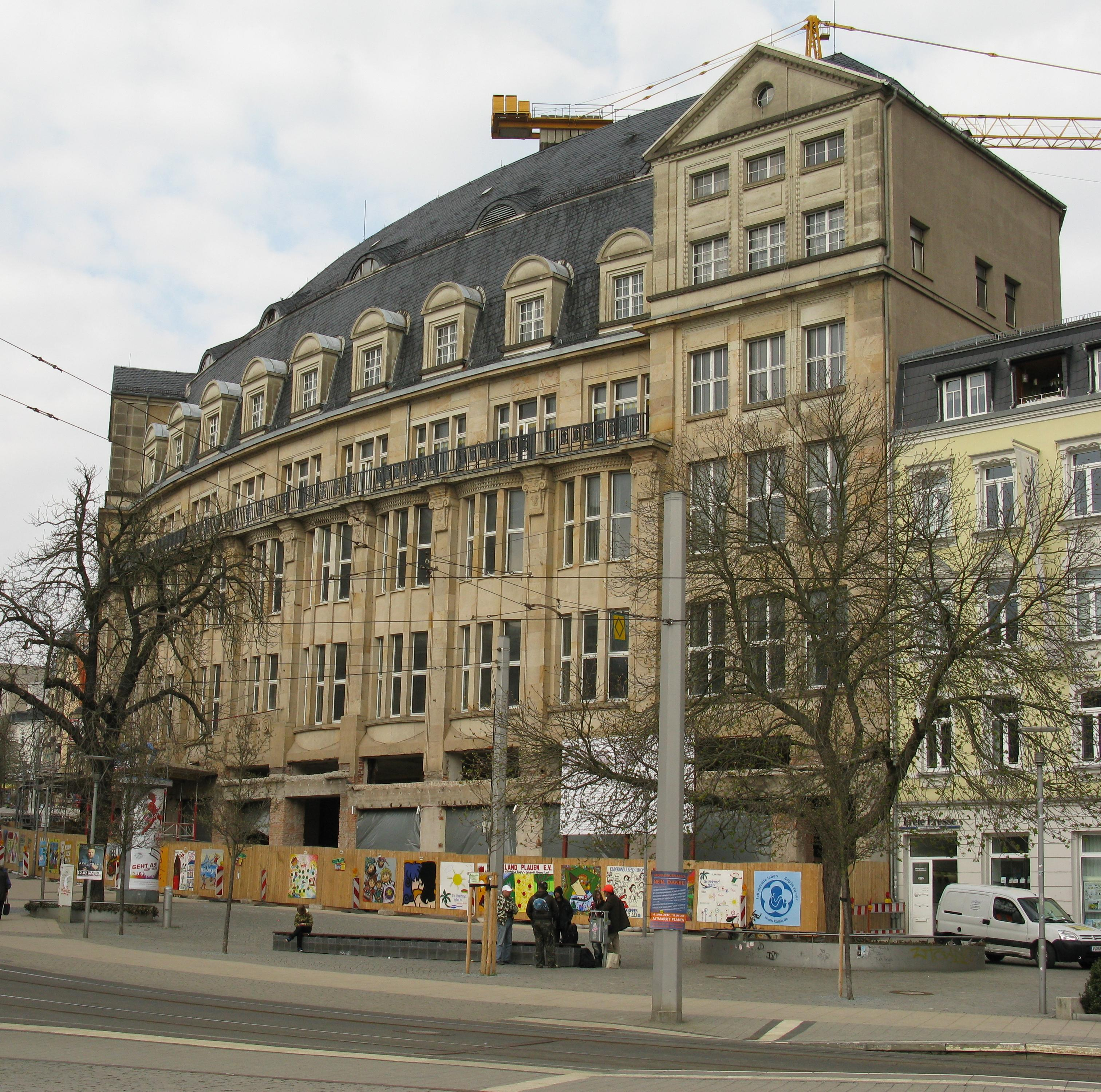 Plauen, denkmalgeschütztes Haus am Postplatz, (Postplatz 5-6). Ehemaliges Kaufhaus (1912: Kaufhaus Tietz, 1947: Kaufhaus Einheit, 1965: Konsument-Warenhaus, 1991-2000: Horten), wird seit 2011 umgebaut zum Landratsamt des Vogtlandkreises.